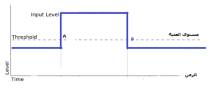 Threshold او العتبة, في هذا الشكل عندما يكون الصوت تحت مستوى العتبة Threshold فإن مخرج الجهاز هو صفر. اما عندما يصبح مسنوى الصوت اعلى من مستوى العتبة في النقطة A , فإن الجهاز يفتح و يقوم بتمرير الإشارة كما هي (دون تعديل).